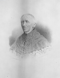 Biskup Jan Deckert (1786-1861)